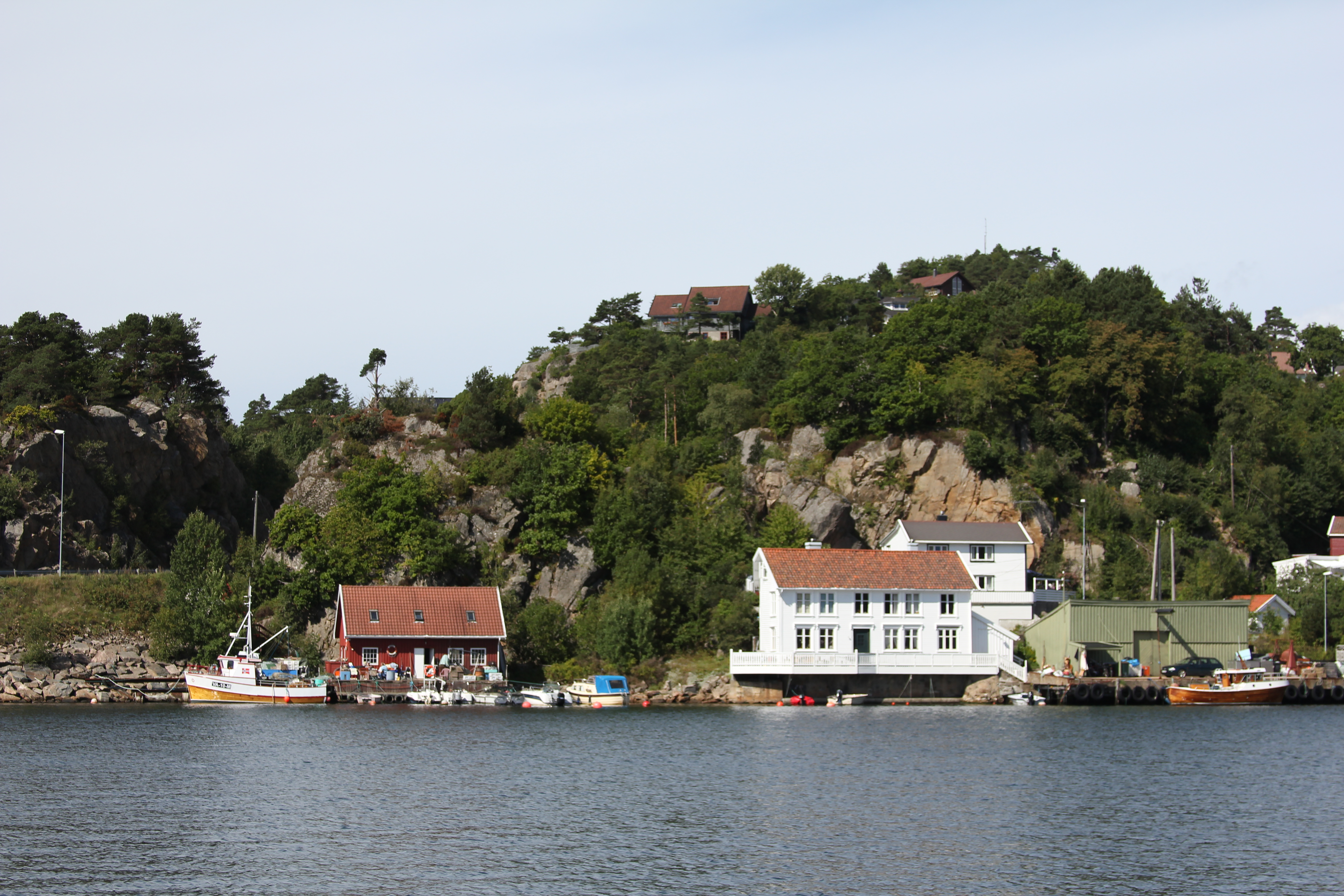 Kleven, Mandal, Vest-Agder, Norway